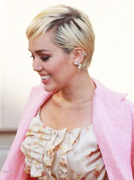 Cyrus en el Rock and Roll Hall of Fame Induction Ceremony del 2015.